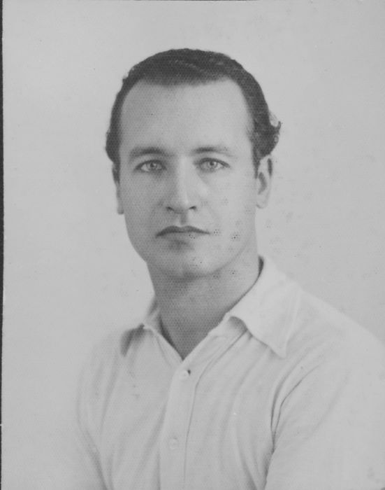 Foto. Portret van Charles Sayers